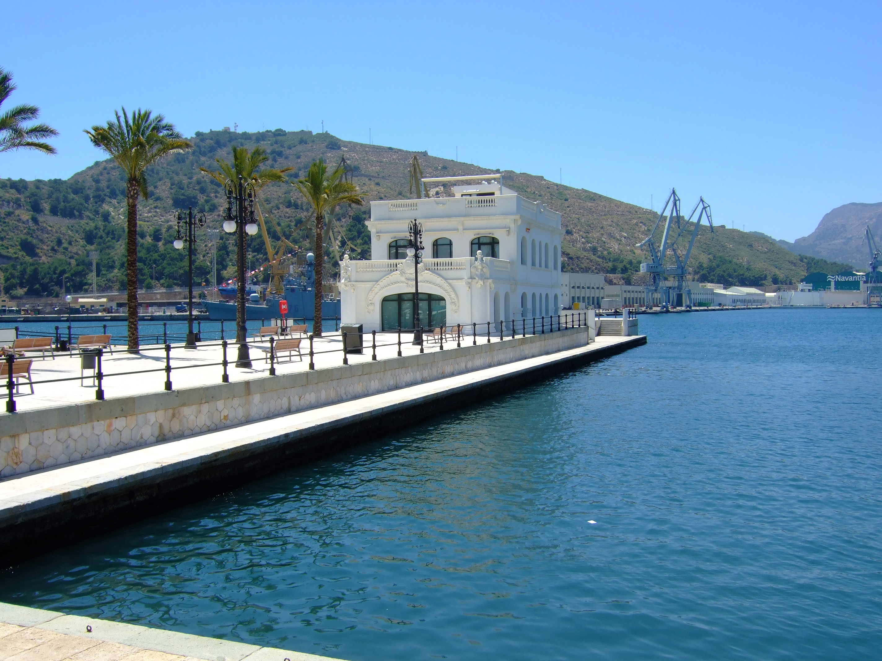 Antiguo Club de Regatas ó Club Náutico en el Puerto de Cartagena - Murcia